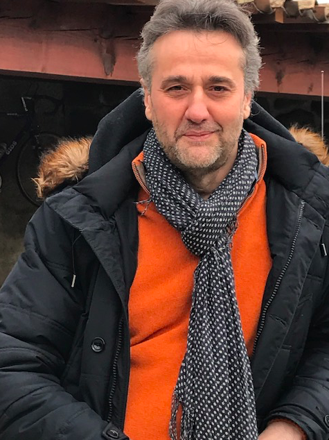 Christophe Mouton